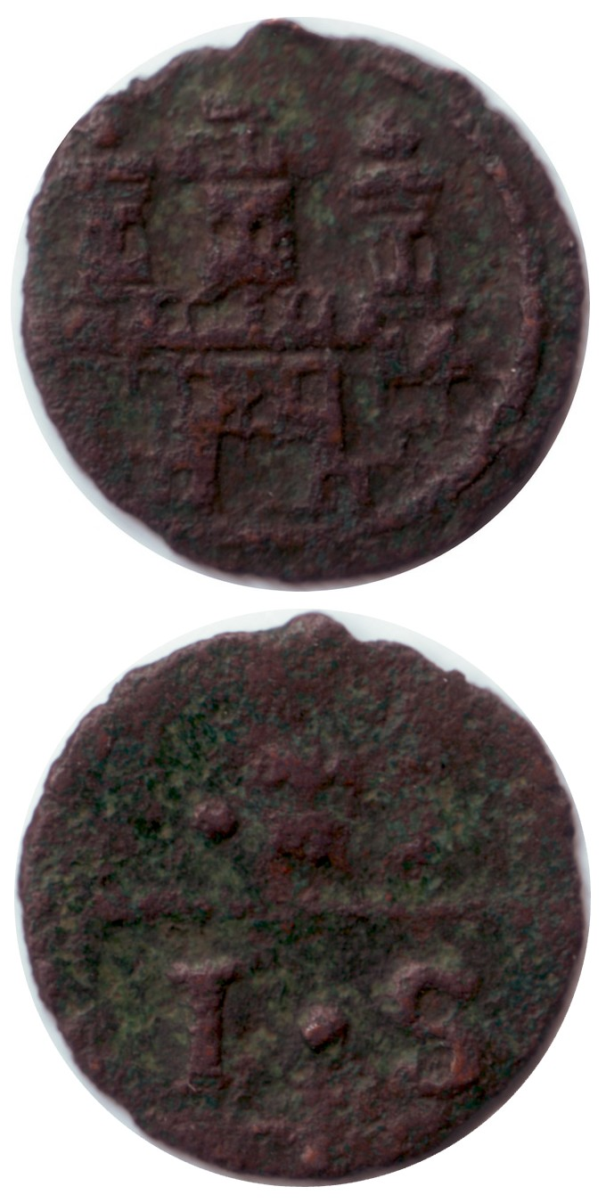 Scherf, halber Pfennig, Kupfer, 16. Jahrhundert, Hamburg.